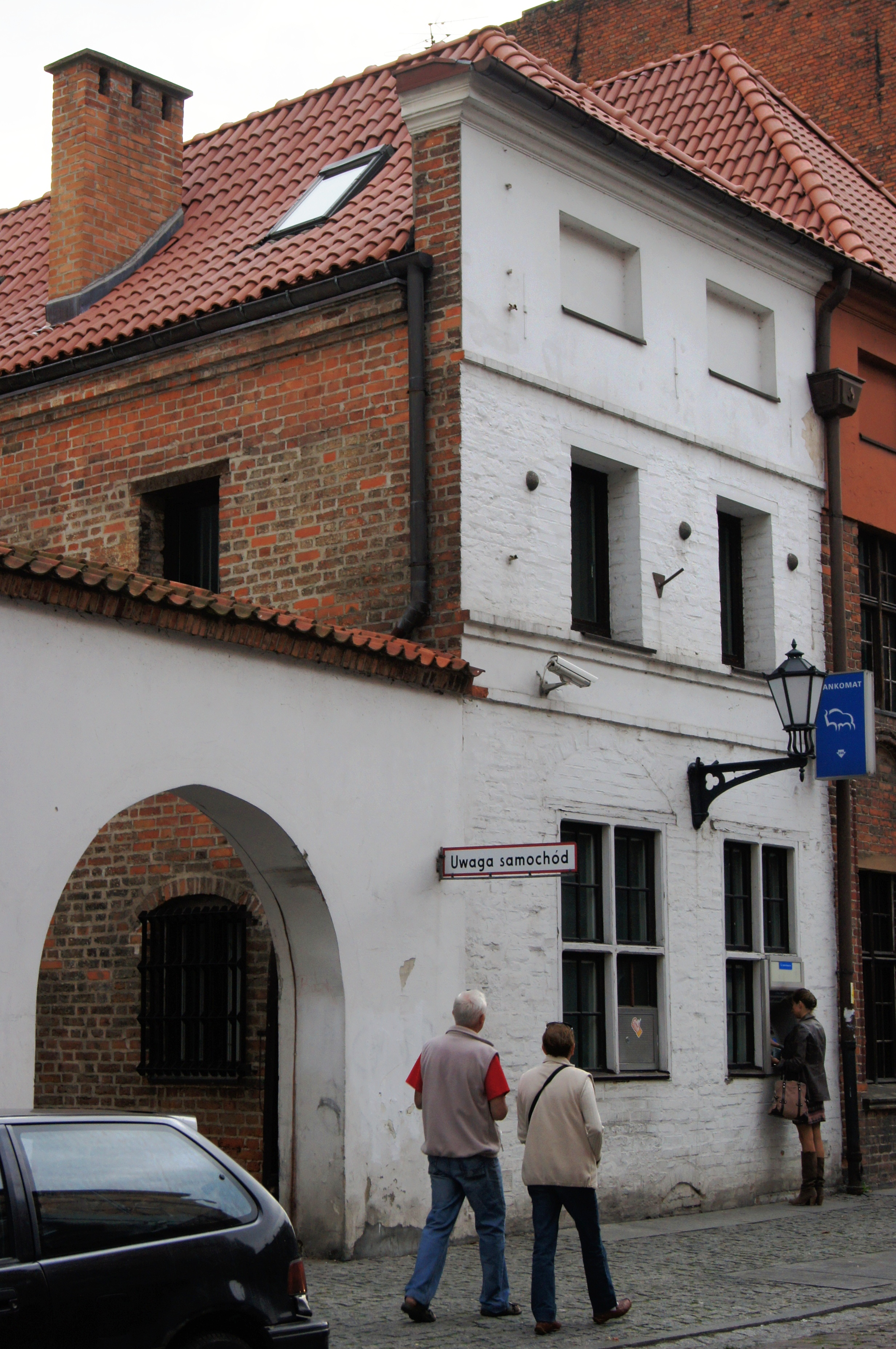 Toruń, ul. Wielkie Garbary 7 - kamienica (z 3 domów), k. XV, XIX, l. 30 XX w. (zabytek nr A/947/1-3)